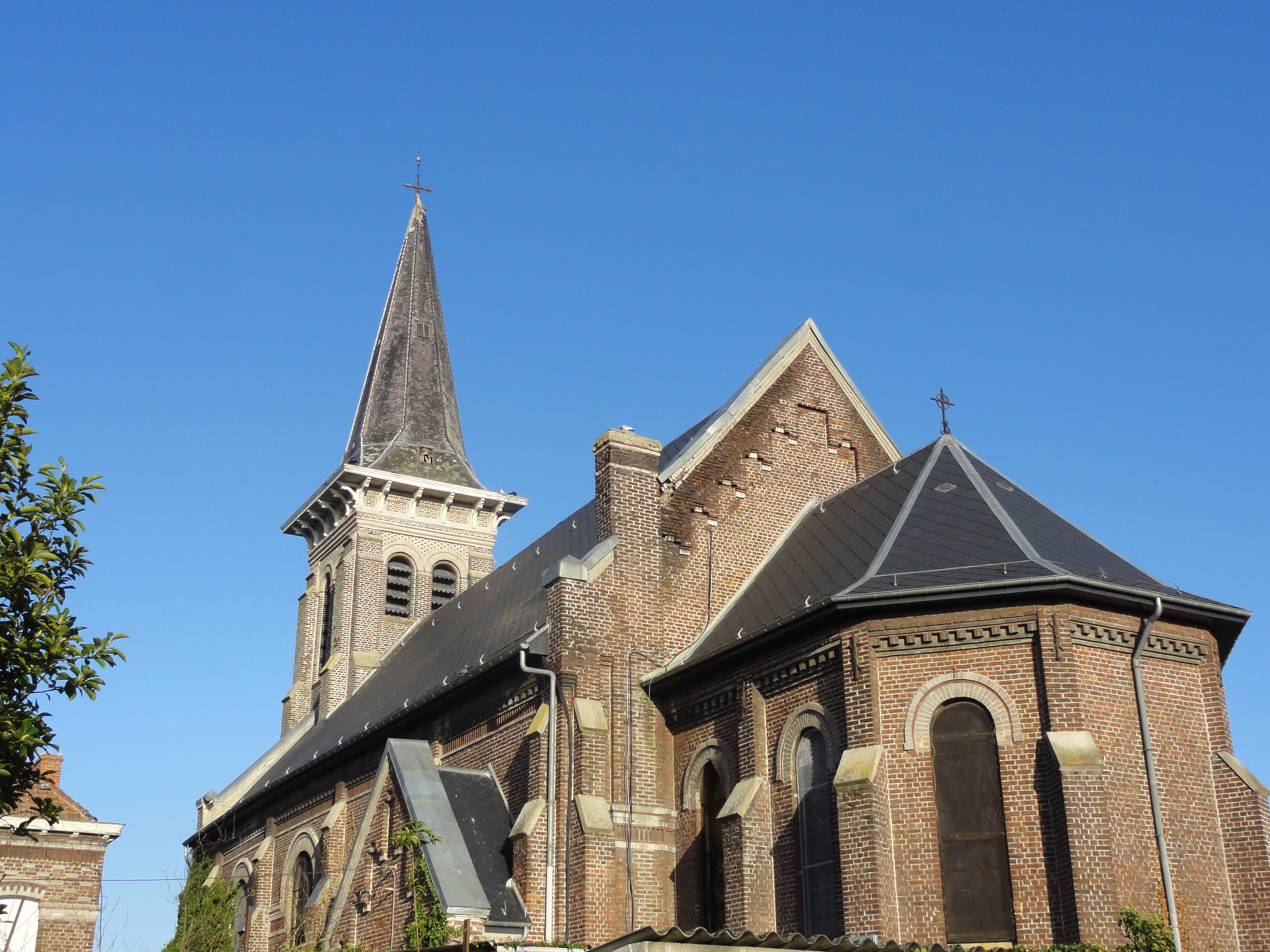 Église Sainte-Barbe des cités de la fosse Arenberg de la Compagnie des mines d'Anzin dans le bassin minier du Nord-Pas-de-Calais, Wallers, Nord, Nord-Pas-de-Calais, France. L'église Sainte-Barbe est inscrite sur la liste du patrimoine mondial par l'Unesco le 30 juin 2012 et y constitue en partie le site no 15.